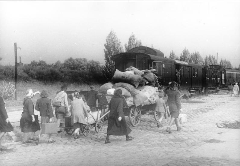 ADN-ZB/Donath Berlin 1946, Pankower Güterbahnhof: Umsiedler benutzen für ihren Weitertransport die Eisenbahn.